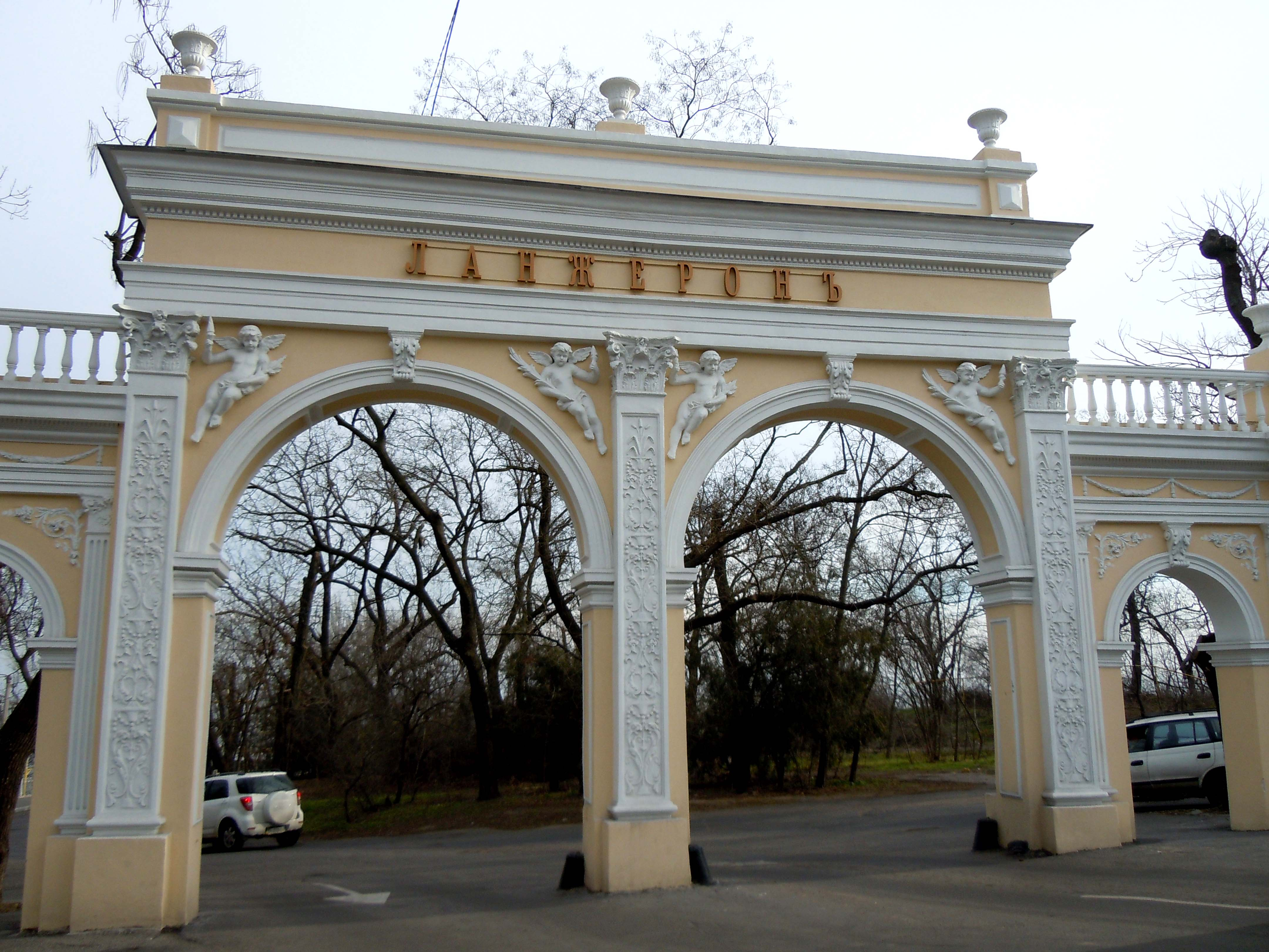 Арка Ланжерона